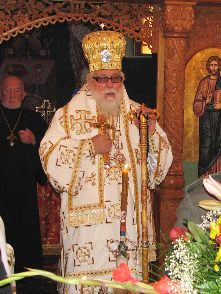 Слика преузета одавде